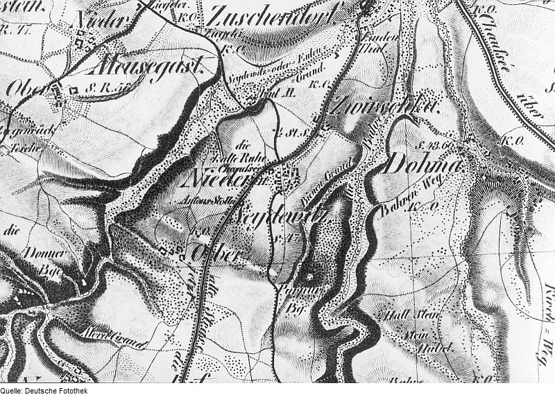 Original image description from the Deutsche Fotothek Bahretal-Niederseidewitz. Oberreit, Sect. Dresden, 1821/22